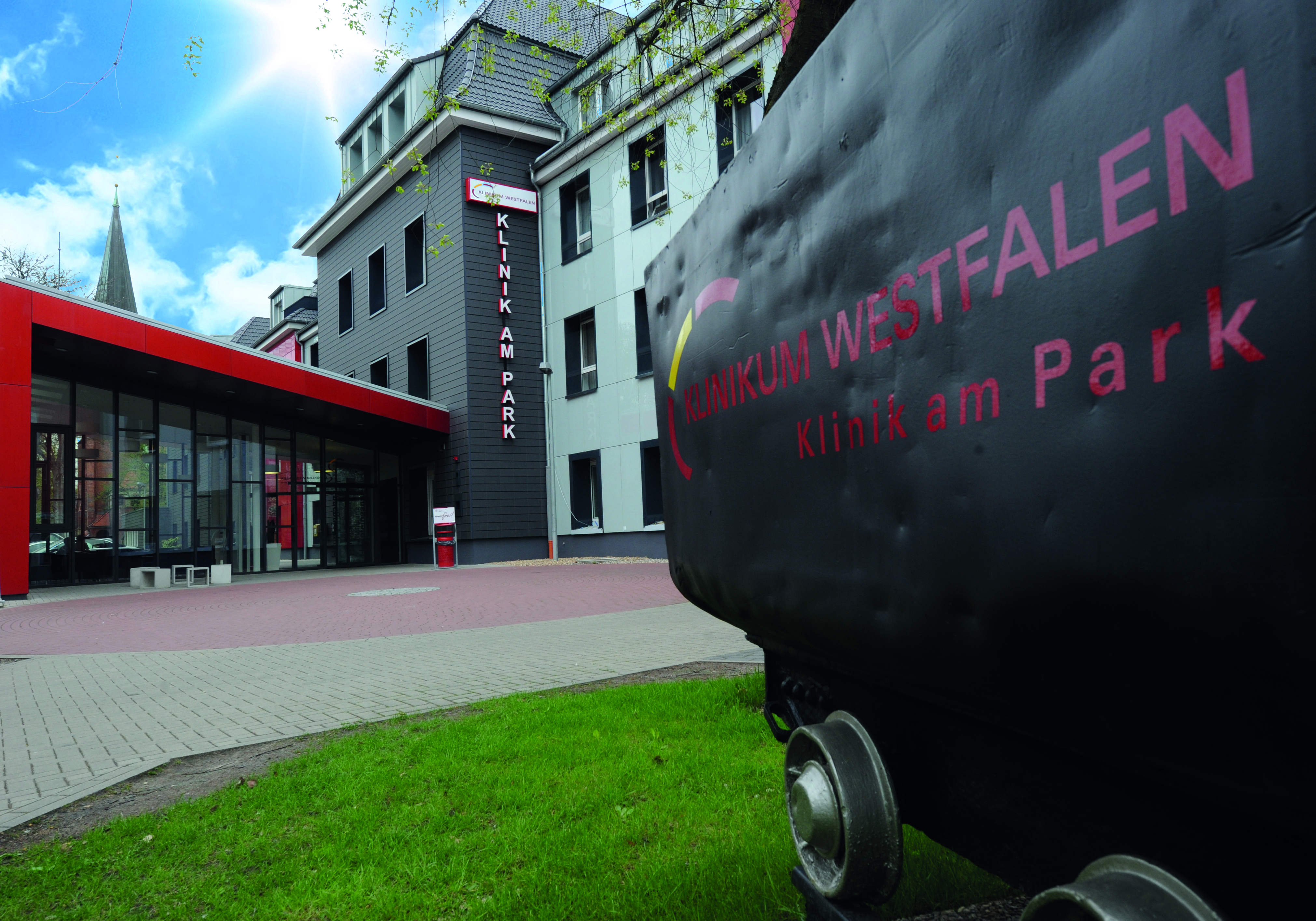 Haupteingang der Klinik am Park Lünen